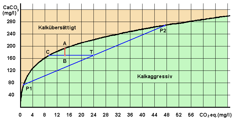 Diagramm Mischungskorrosion nach Bögli 1963